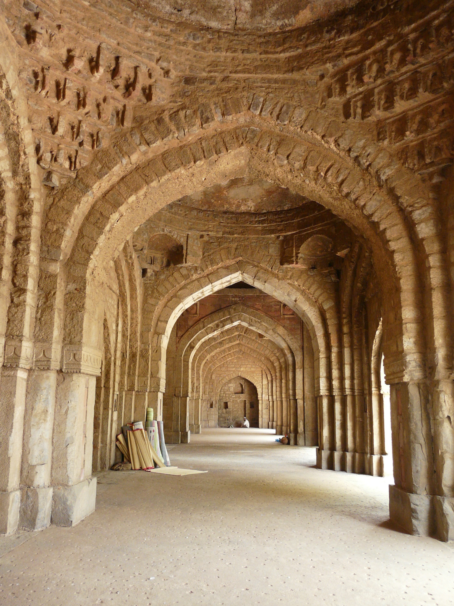 Jamali Kamali mosque interior